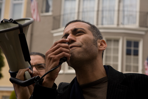 hossam el-hamalawy